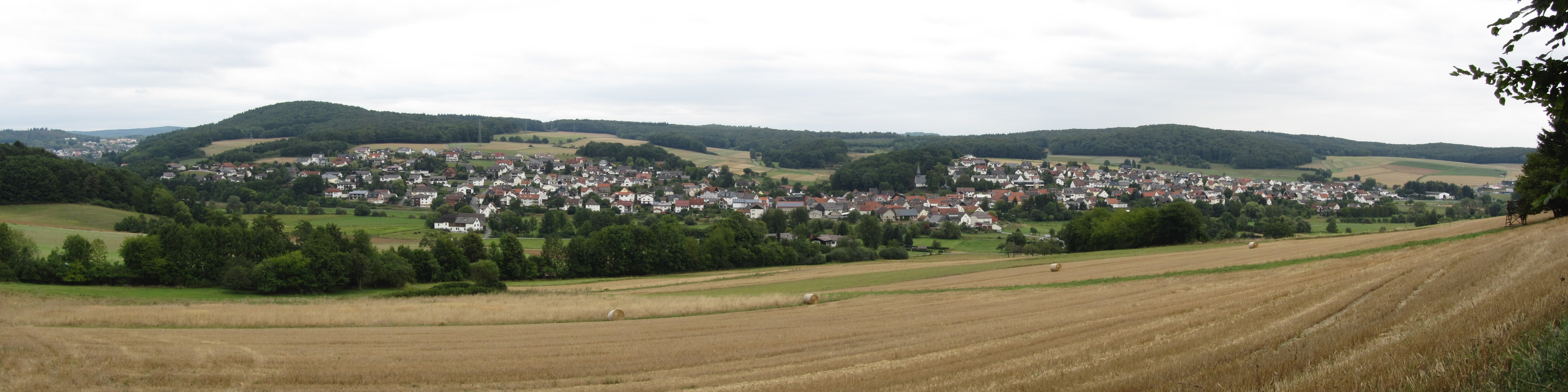 Panorama von Mornshausen. Gladenbach ganz links im Bild. Vor Mornshausen ist der Verlauf der Salzböde erkennbar. Standort: am nordöstlichen Hang des 448m hohen Dreisberg